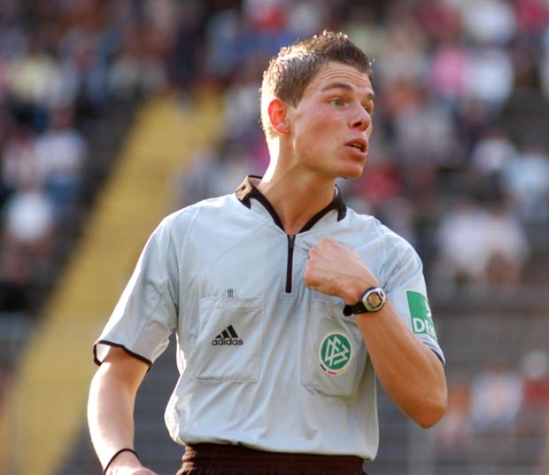 Michael Kempter, damals jüngster Bundesliga-Schiedsrichter